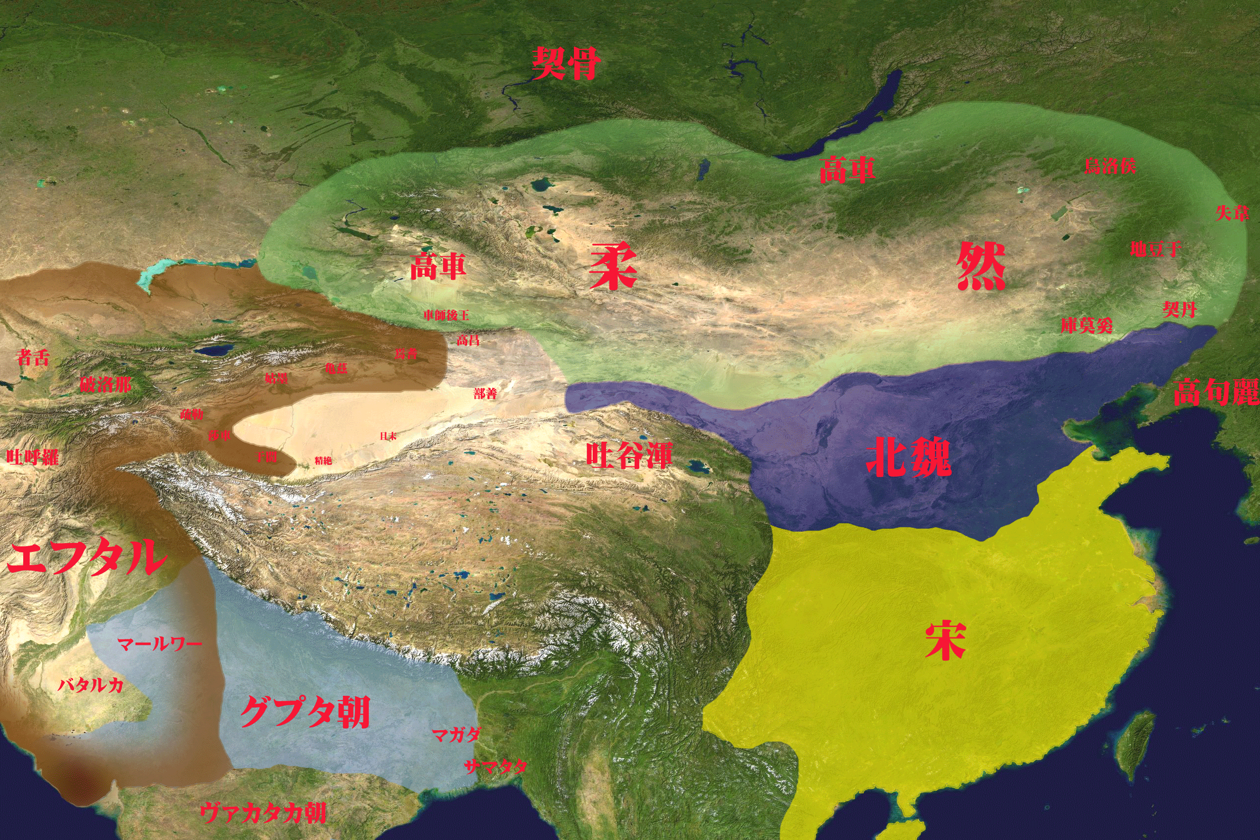 4世紀頃の柔然とその周辺国。